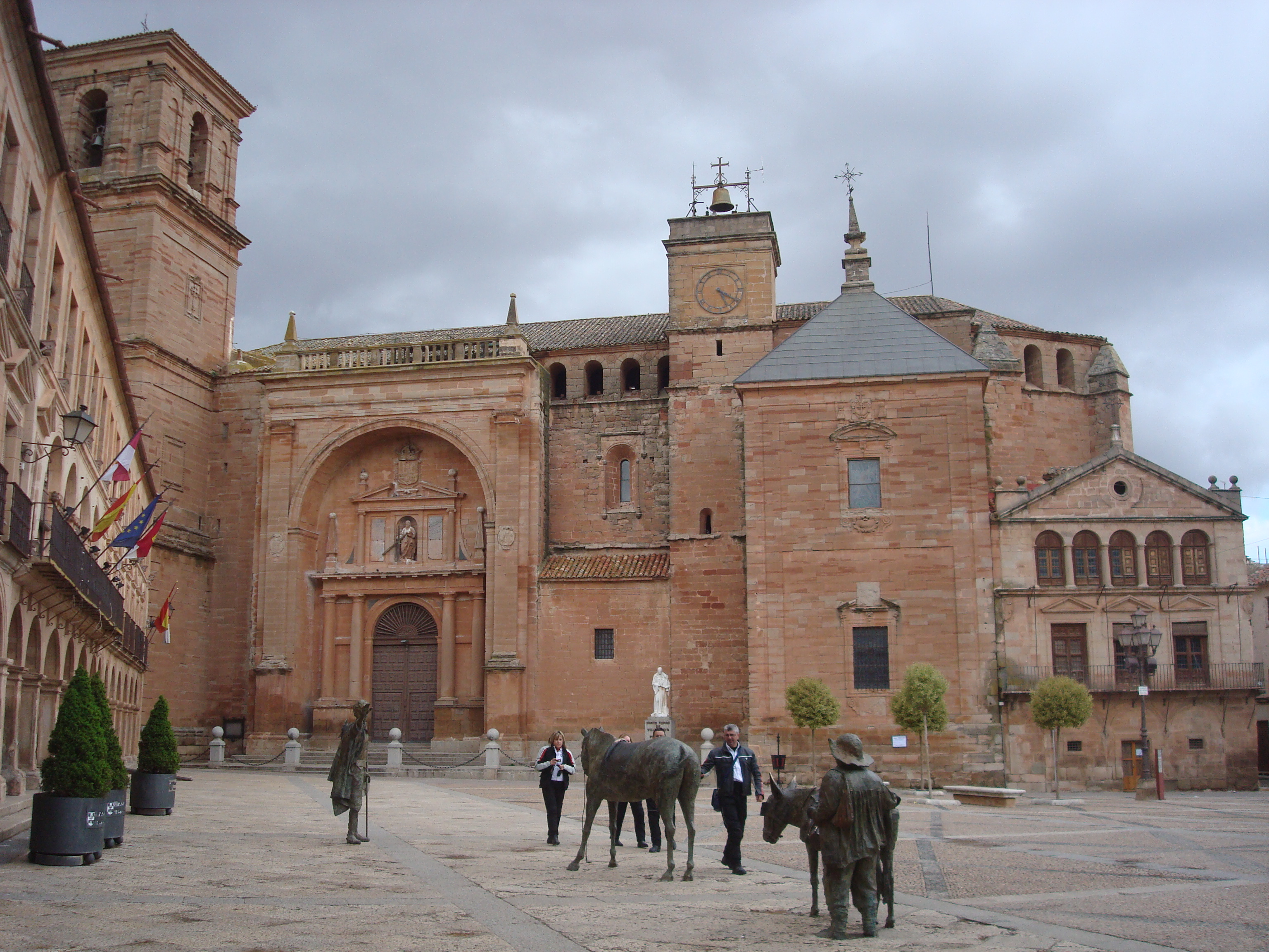 Villanueva de los Infantes, Spain.